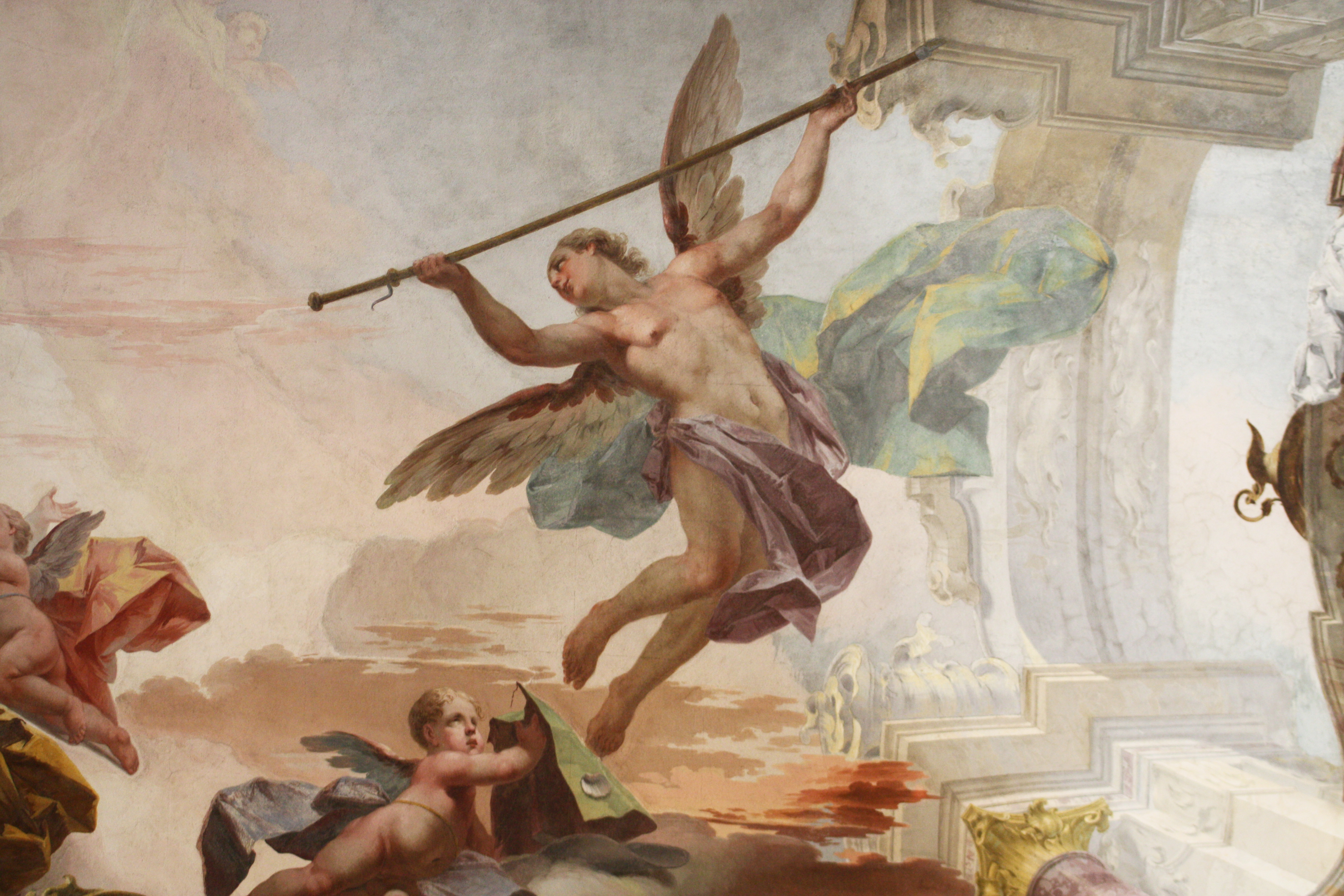 Particolare di un affresco nell'abside della basilica di San Giovanni Battista a Busto Arsizio, opera di Biagio Bellotti. This is a photo of a monument which is part of cultural heritage of Italy.